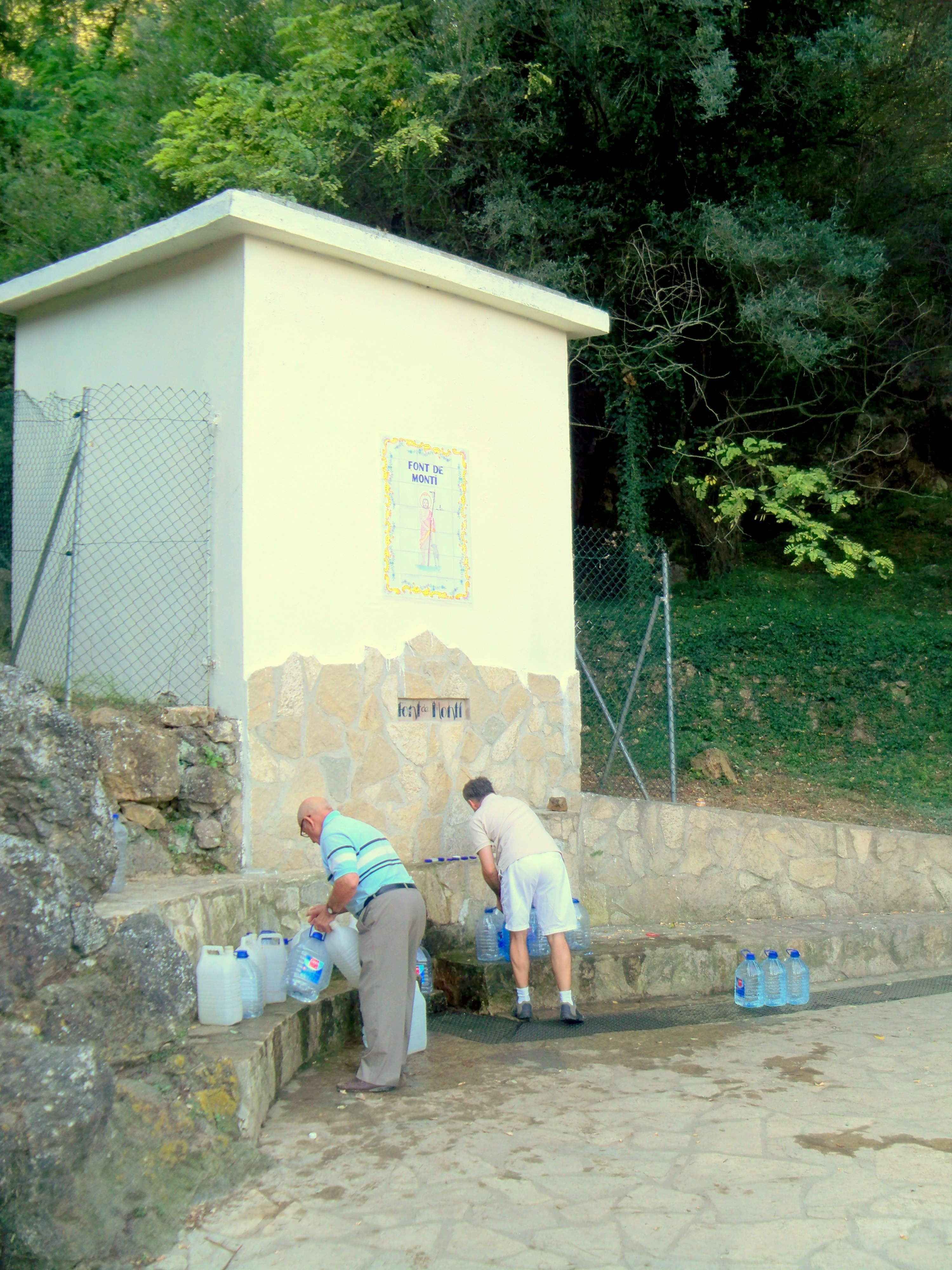 Fuente de Montí, Tales (Castellón) Parque Natural de la Serra d'Espadà